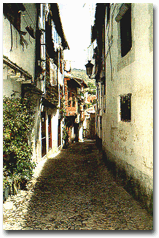 calle de juderia